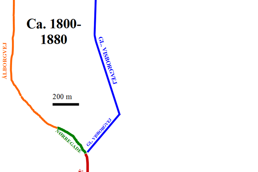 Dette er et billede af Østergades historie i Hadsund